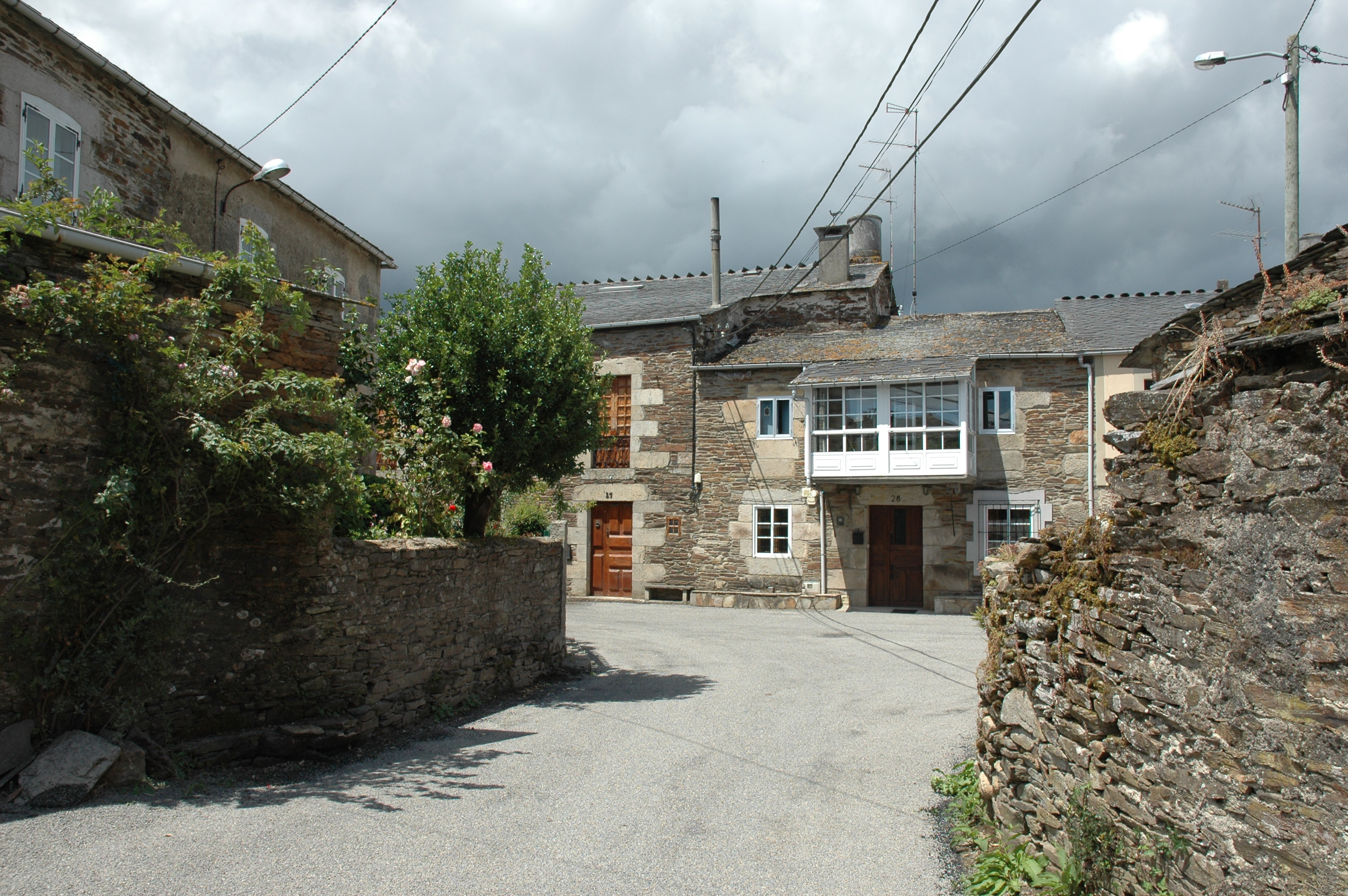 Viviendas en la aldea de Bolaño, Castroverde, Lugo, Galicia.